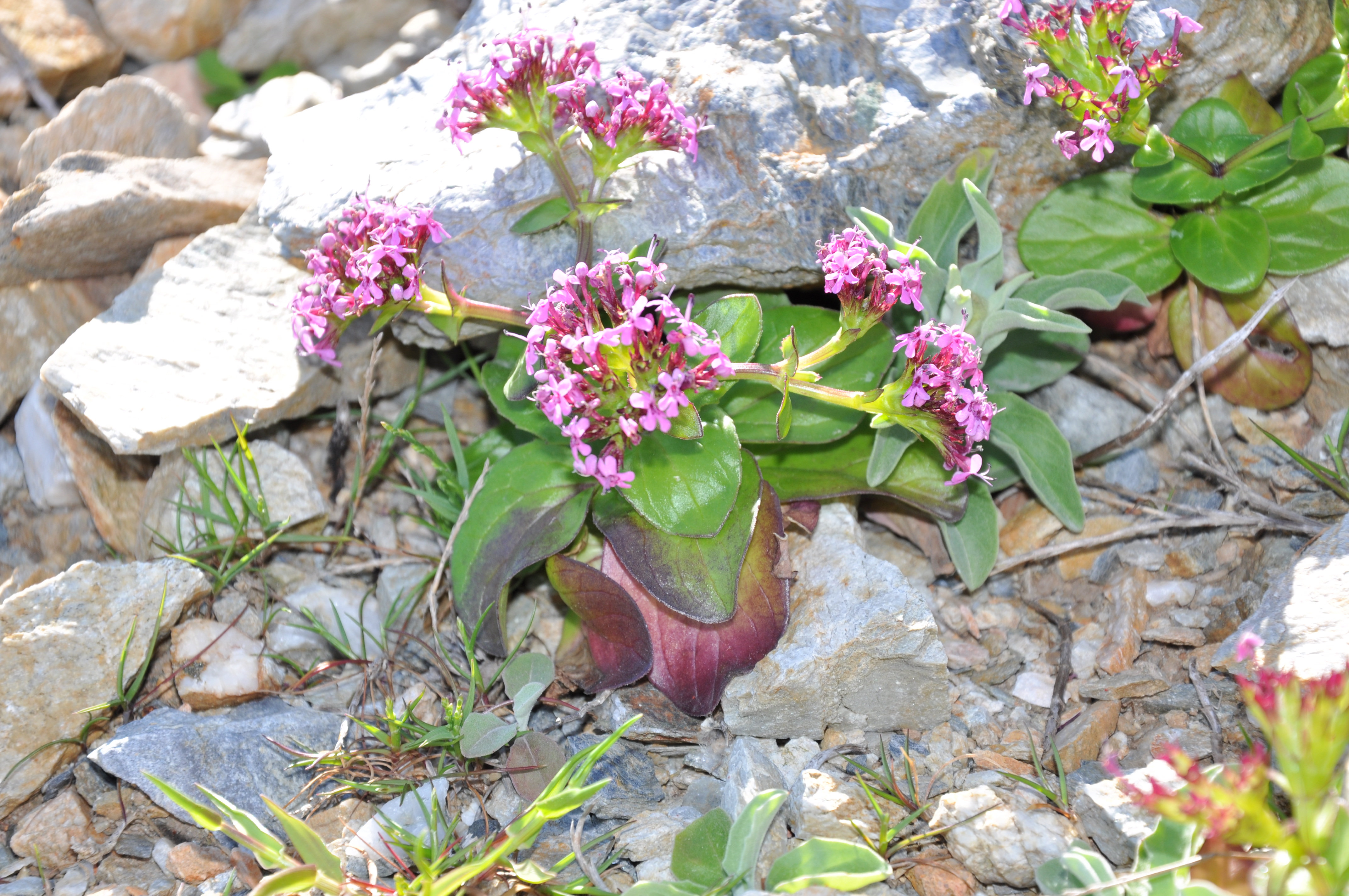 Trompetillas (Fedia cornucopiae) Ceuta, España.